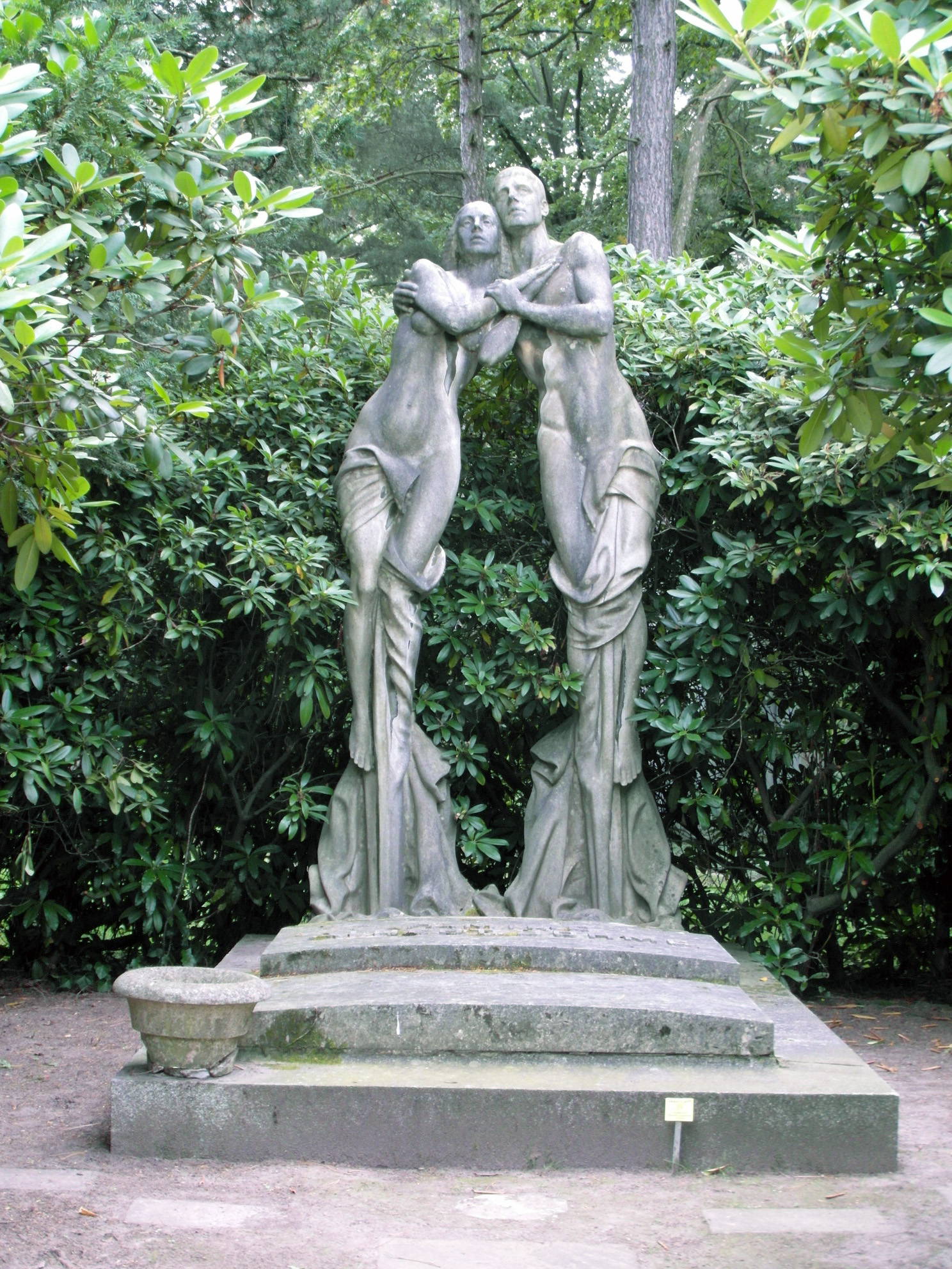 Albrecht Leistner: Auferstehung, Grabmalplastik, Marmor für den Delitzscher Schokoladenfabrikanten Albert Böhme